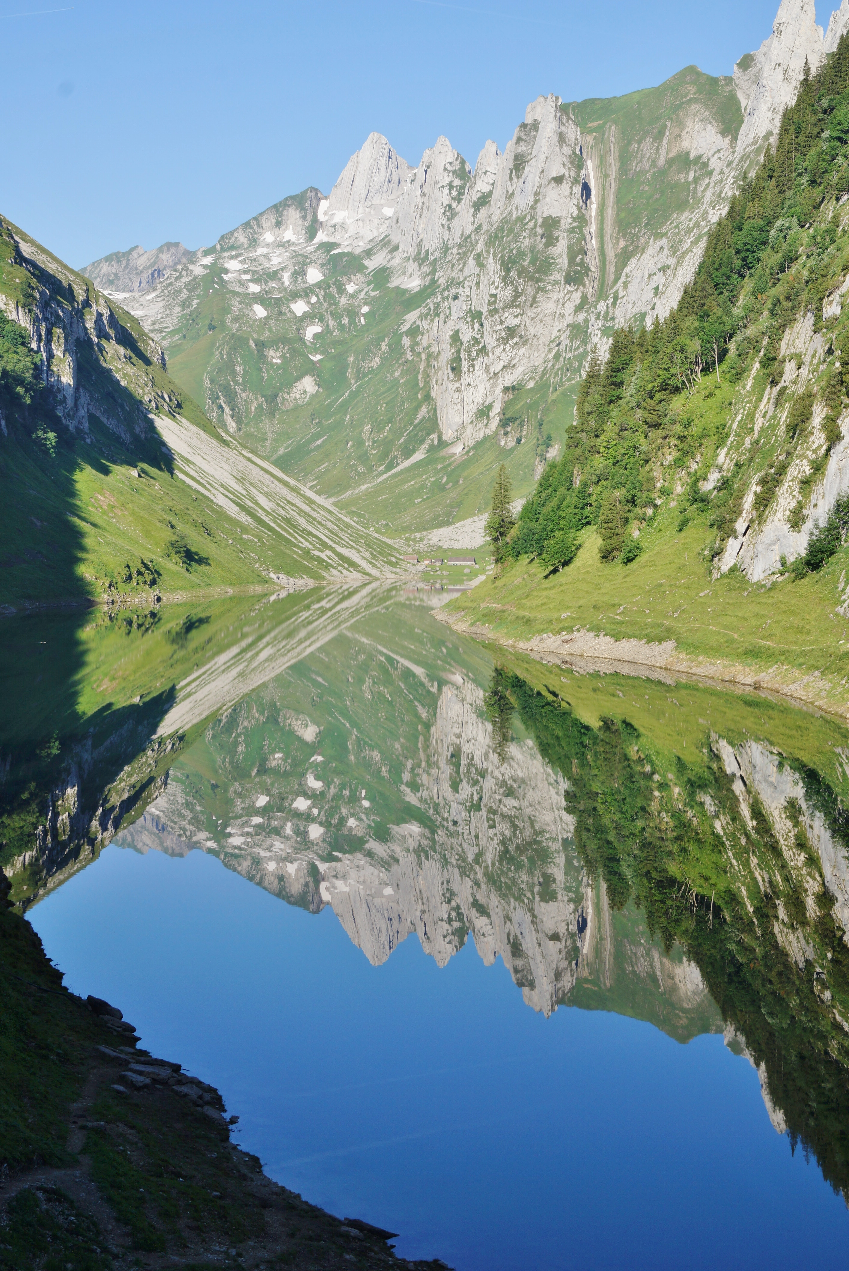 Fählensee (1.447 m) vom Weg nördlich von Bollenwees (1.471 m) am Morgen, Blickrichtung WSW zum Altmann (2.435 m).